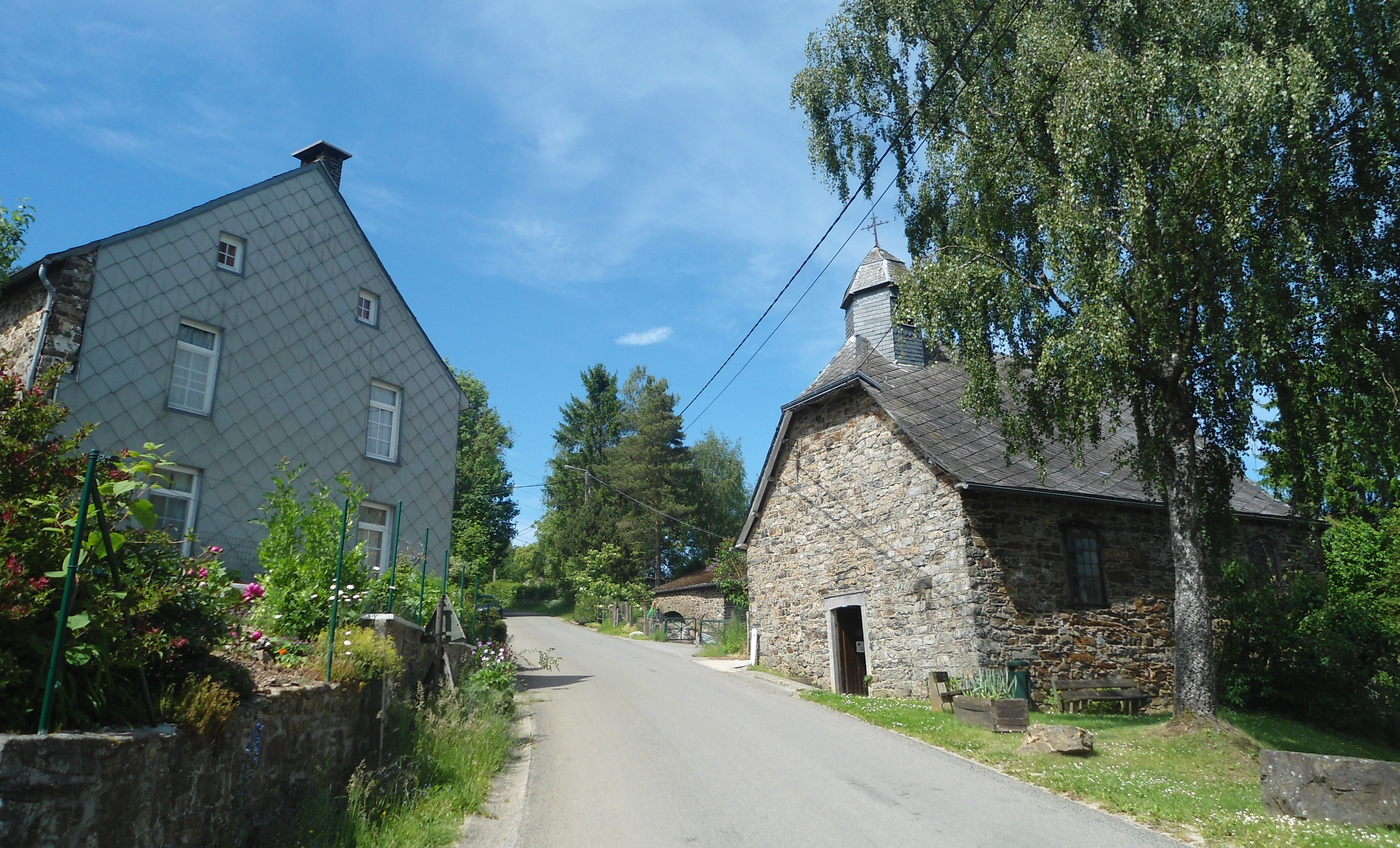 Chapelle Saint Hilaire à Brume (Trois-Ponts)